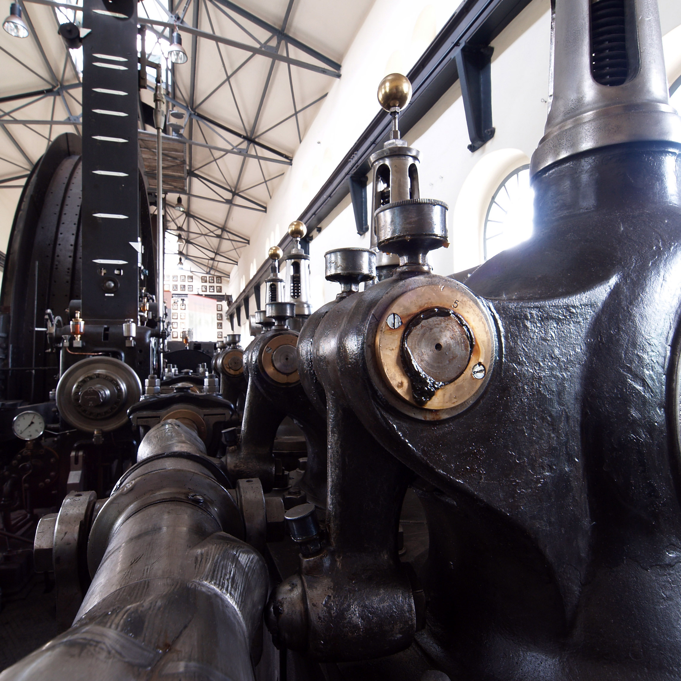 Staufferbécksen